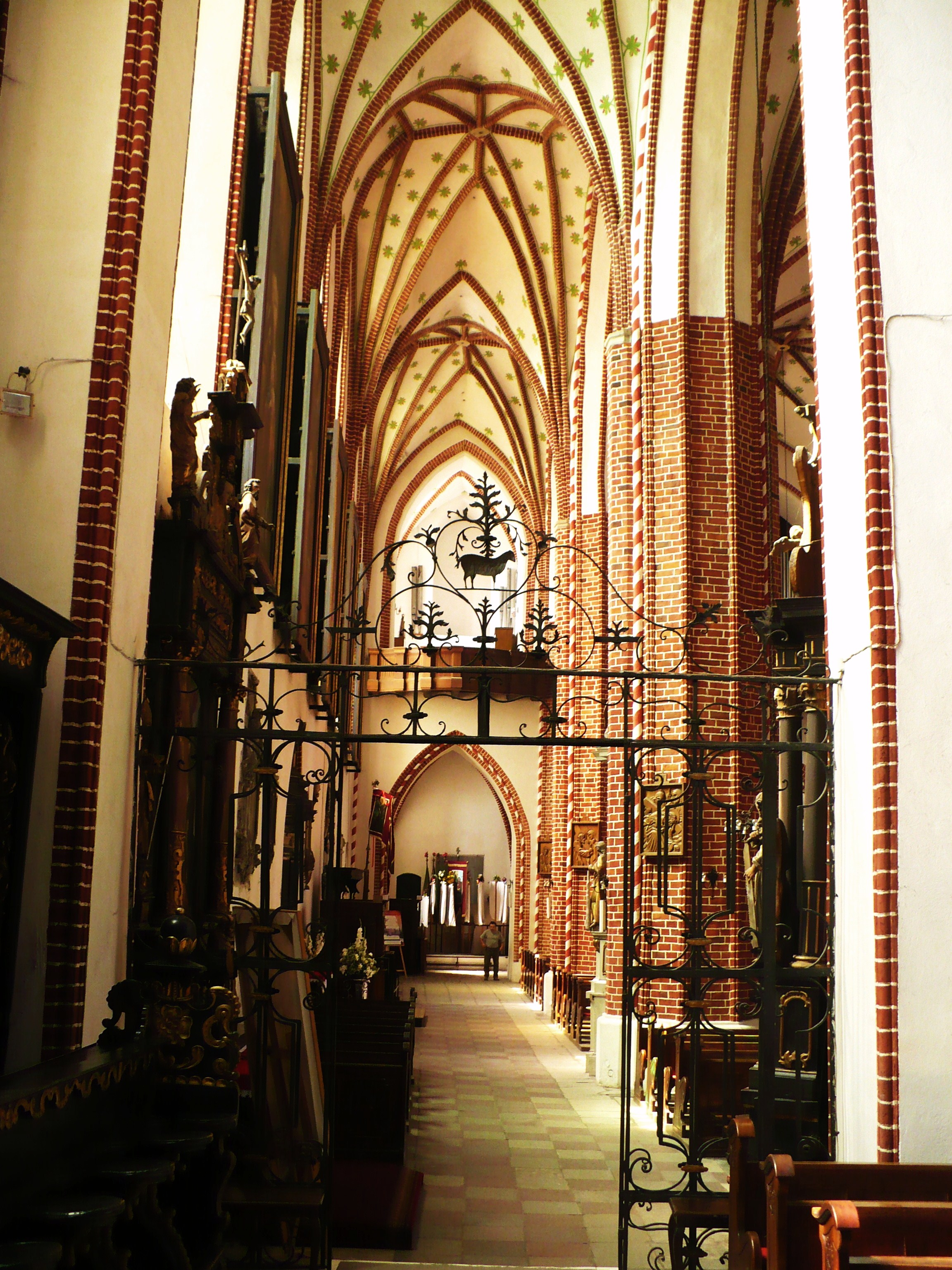 Chełmża, kościół katedralny pw. Św. Trójcy, 2 poł. XIII-XVII